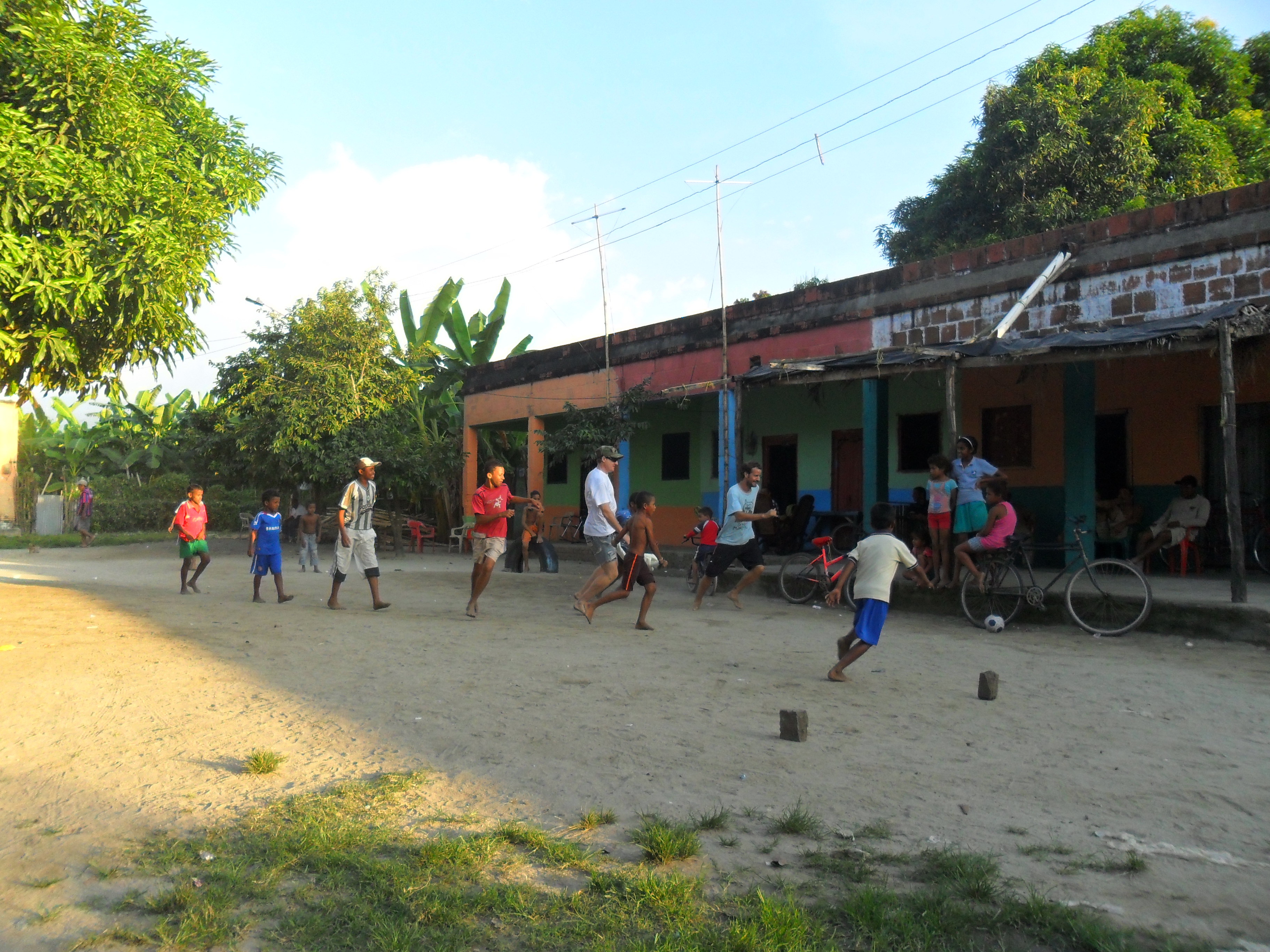 Una calle en la Vereda Macondo, Zona Bananera, a 30 minutos de Aracataca, Colombia.